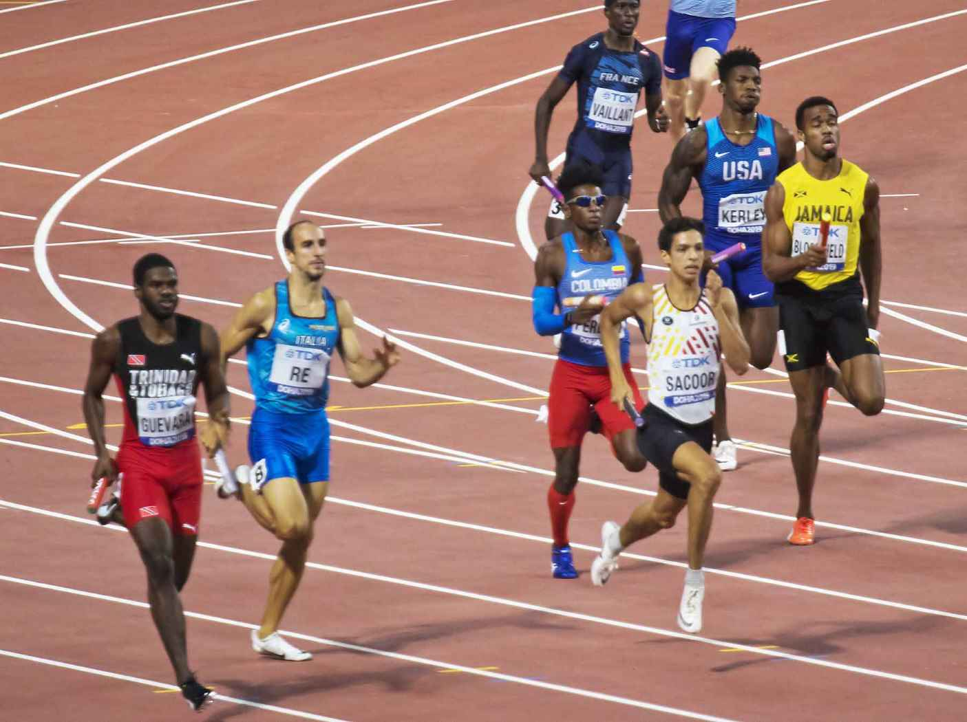 DOH90192 4x400m men final sacoor